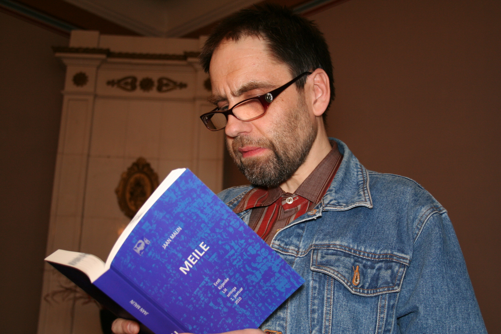 Jaan Malin tutvustab oma uut raamatut Kirjanike Liidu üldkogul Tartus 23. märtsil 2012.